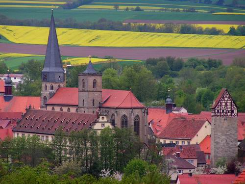 Münnerstadt Zentrum, by Joshua Feiring, GNU-FDL